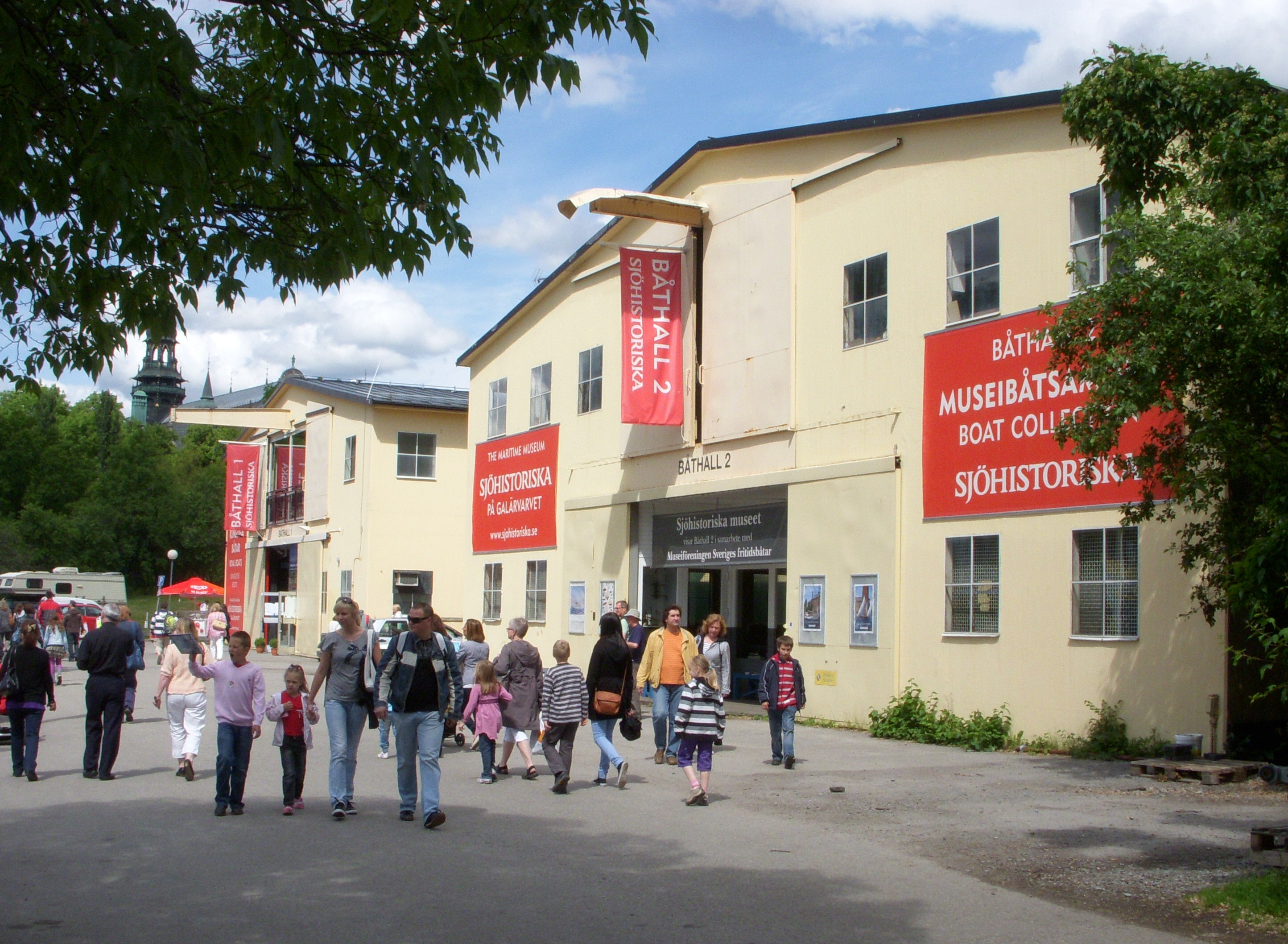 Båthall 1 och 2 på Djurgården